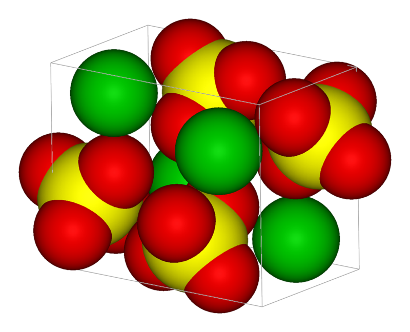 Barium sulfat 3D